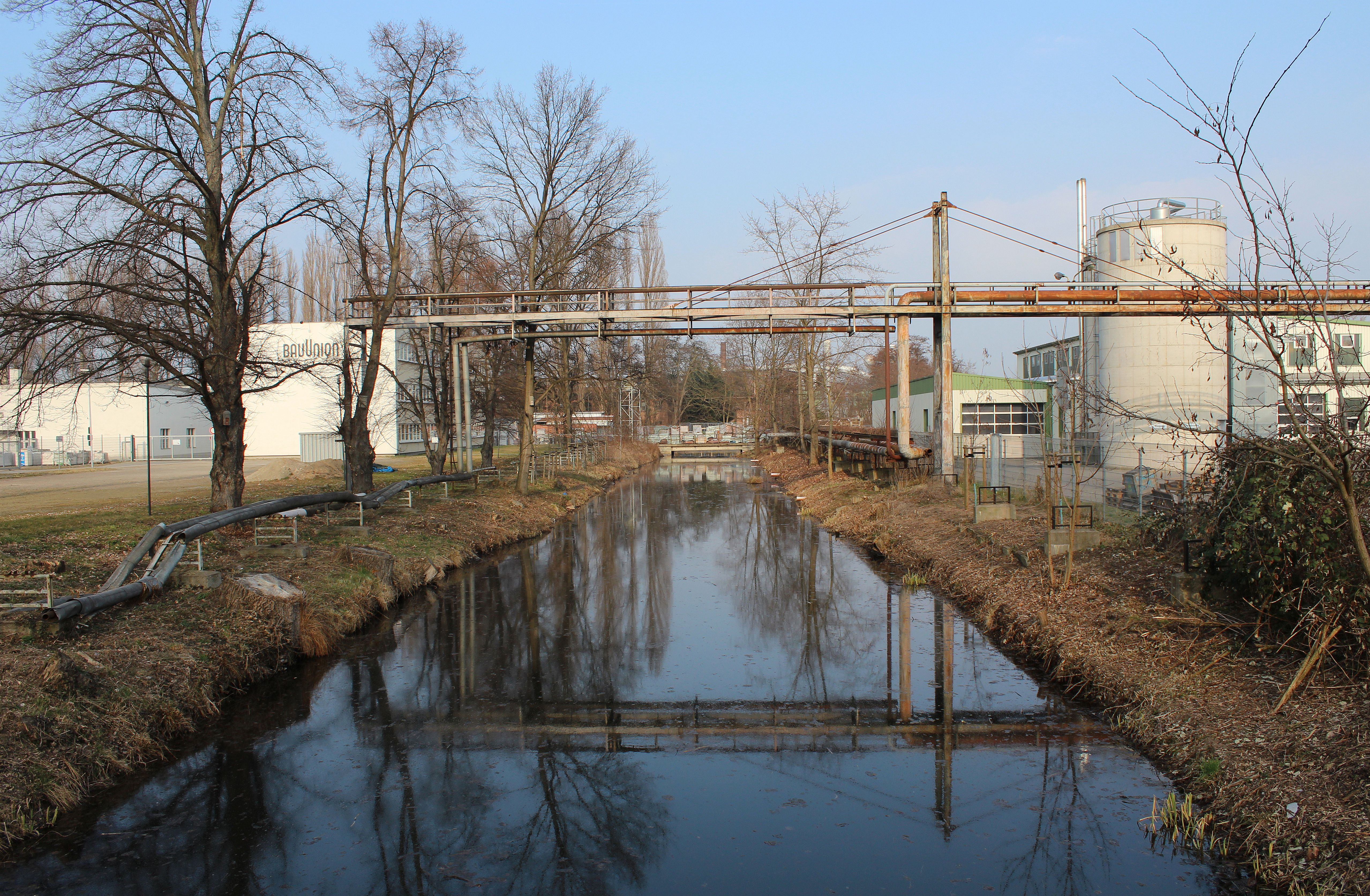 Der Elsterwerda-Grödel-Flosskanal in Gröditz.